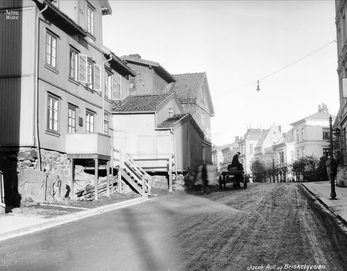 Oppover Eilert Sundts gate mot Briskebyveien. Til venstre ses nr. 14 og 16, til høyre nr. 13 og videre (forbi Briskebyveien) bl.a. nr. 19 og 21. Foto: Anders Beer Wilse, 1927. Fra Byhistorisk samling hos Oslo Museum.